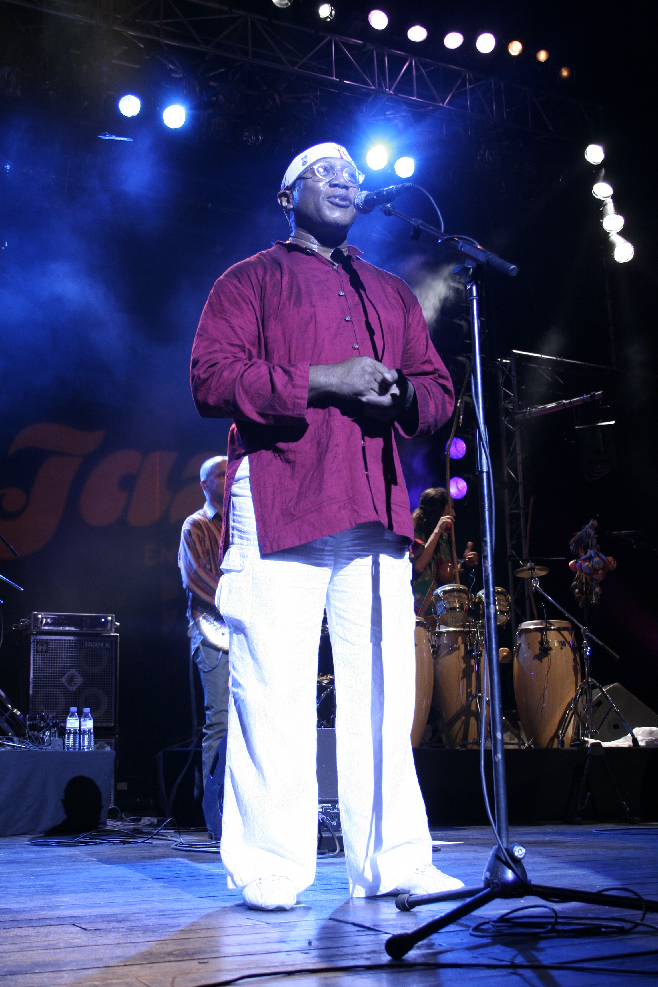 Billy Cobham en concert à la Réunion.